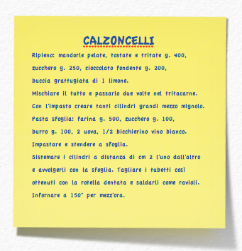 Ricetta dei Calzoncelli